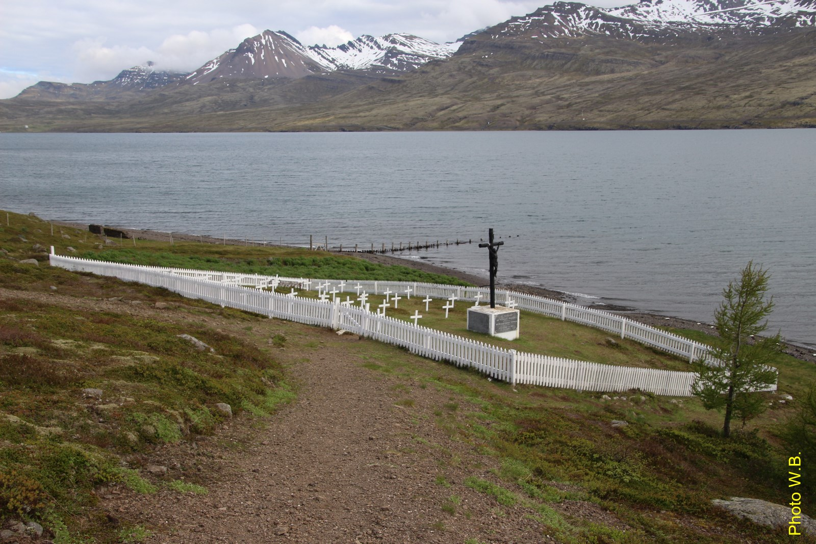 cimetière français de Fáskrúðsfjöður